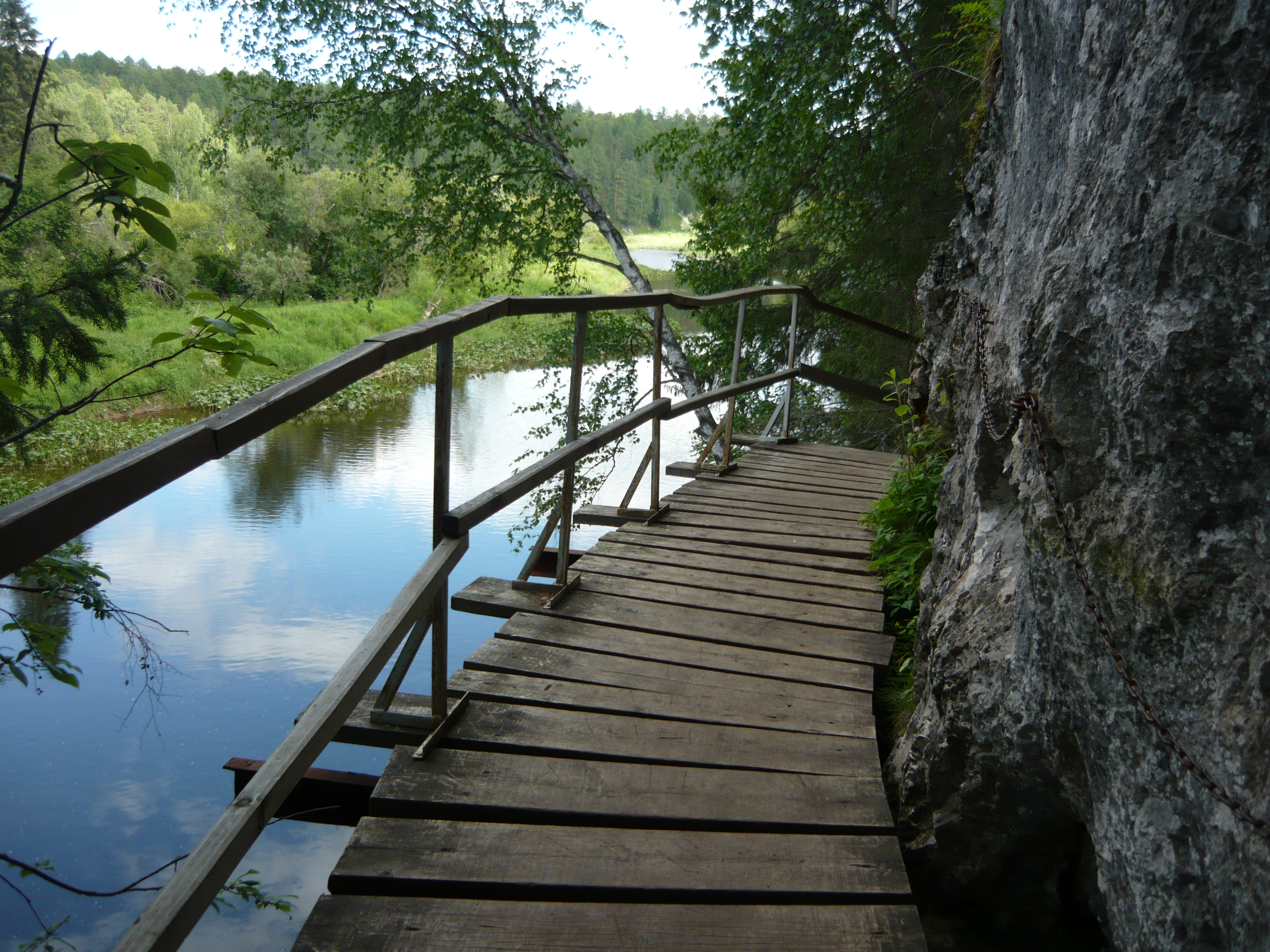 Оленьи ручьи, Нижнесергинский район This image is related to the protected area of Russia number 6610424